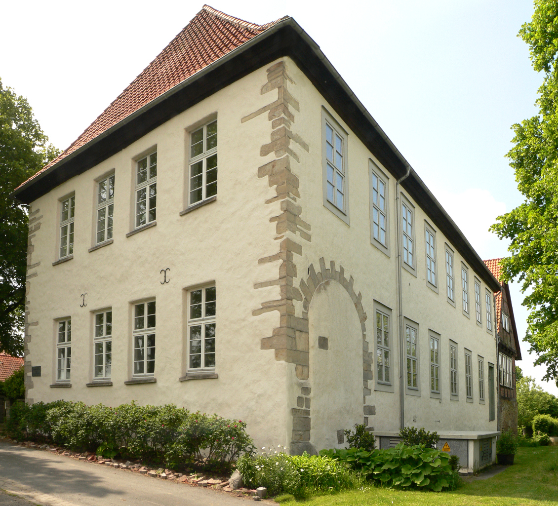 Ansicht von Schloss Bokeloh